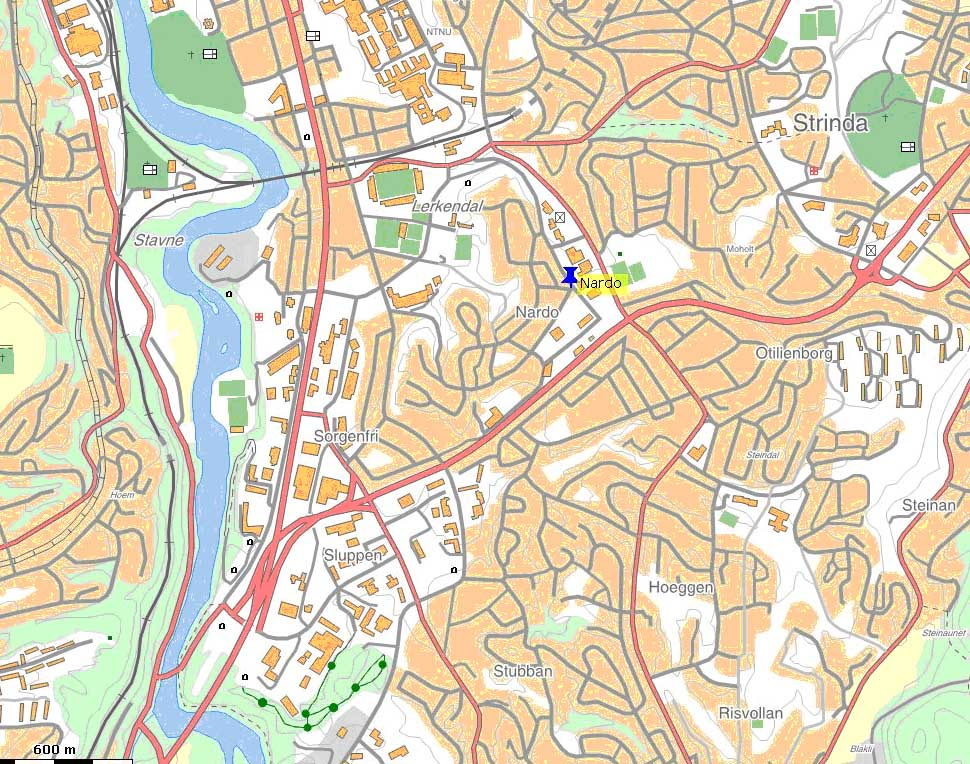 Nardo - Trondheim, Norway